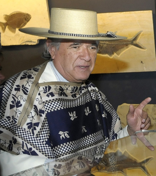 Carlos Cardoen, empresario chileno.